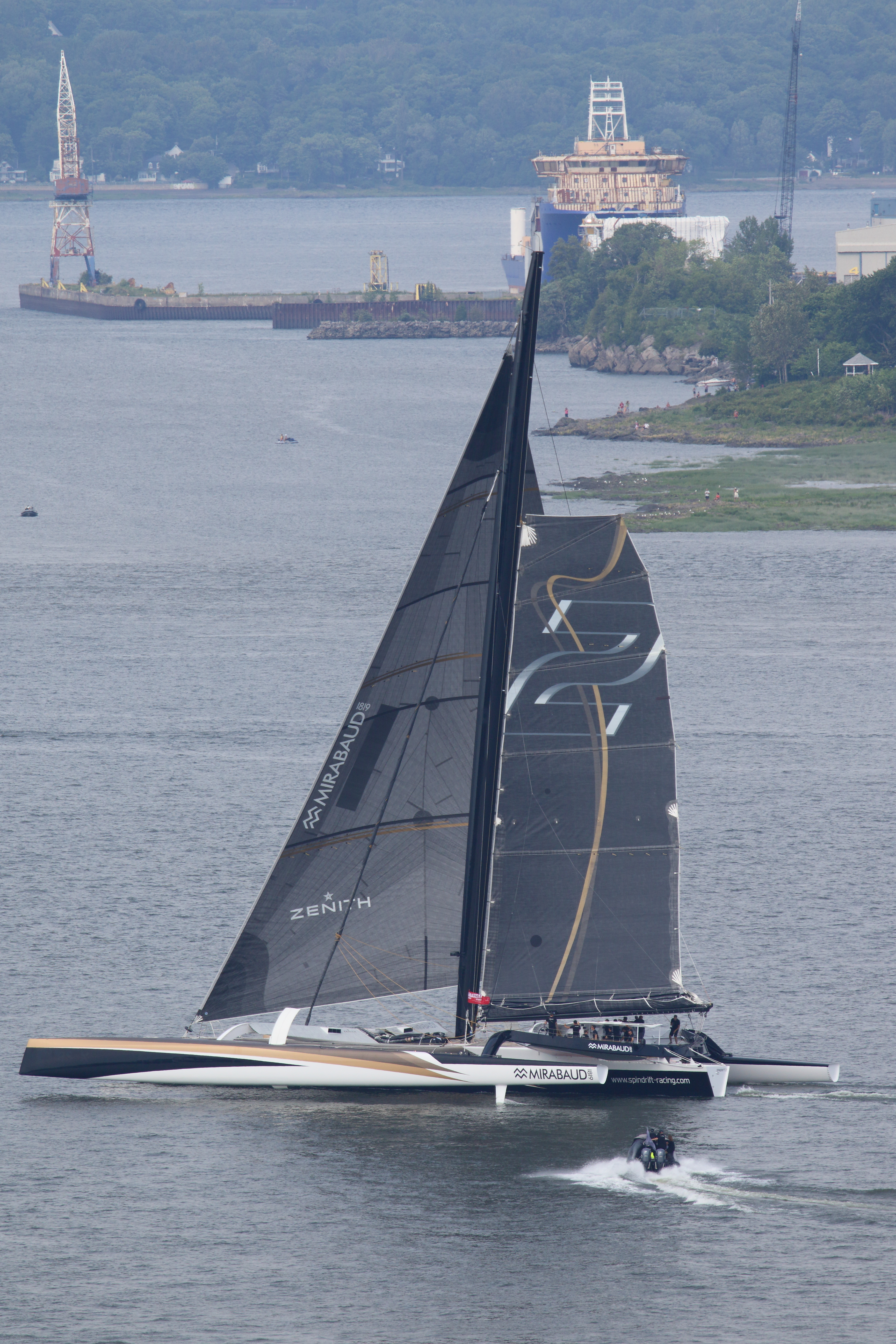 SPINDRIFT 2 au départ de la Transat Québec-Saint-Malo